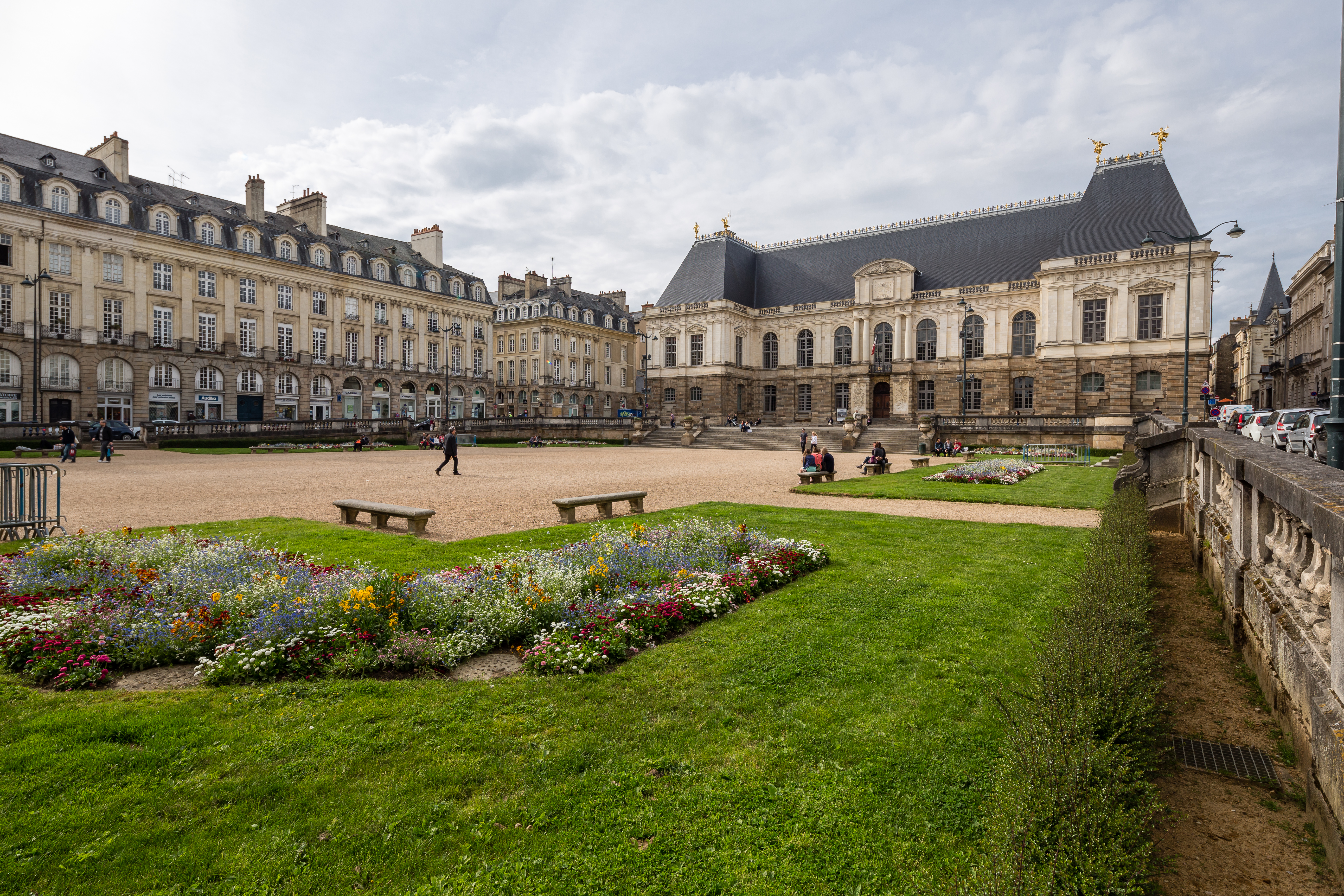 Vue d'ensemble de la place du parlement de Bretagne à Rennes (France), depuis son angle sud-est.